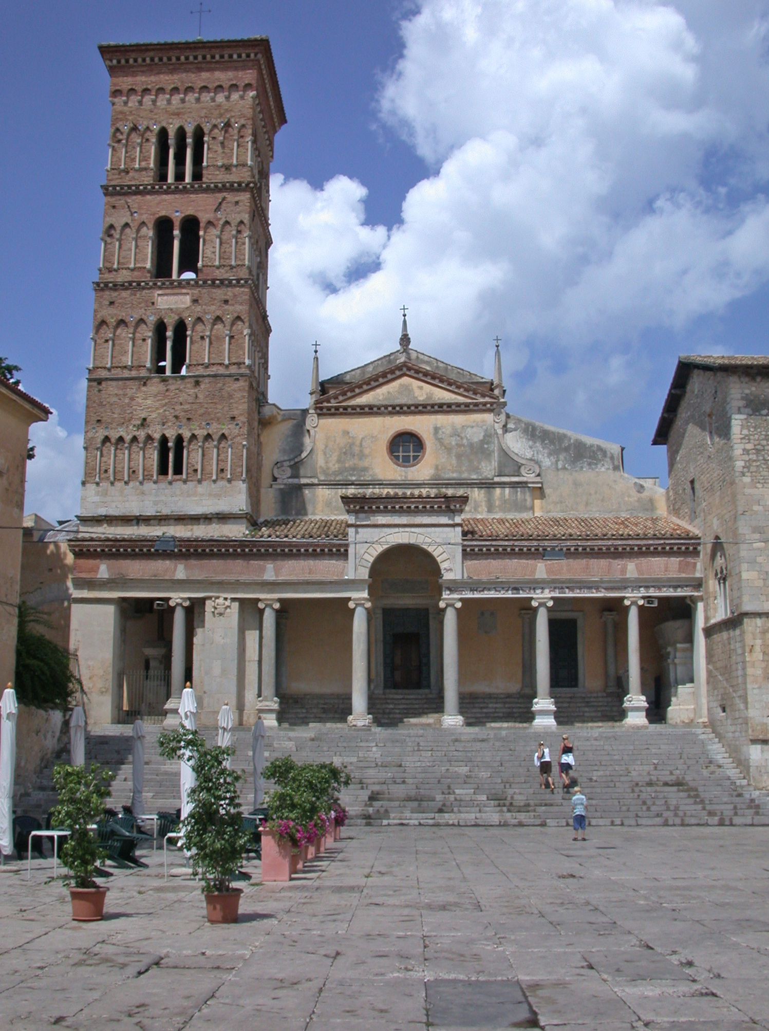 Terracina (provincia di Latina, Lazio, Italia), città alta, Duomo di San Cesareo, facciata sul Foro Emiliano.